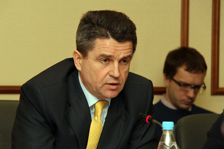 Владимир Маркин — руководитель управления взаимодействия со средствами массовой информации Следственного комитета при прокуратуре Российской Федерации.